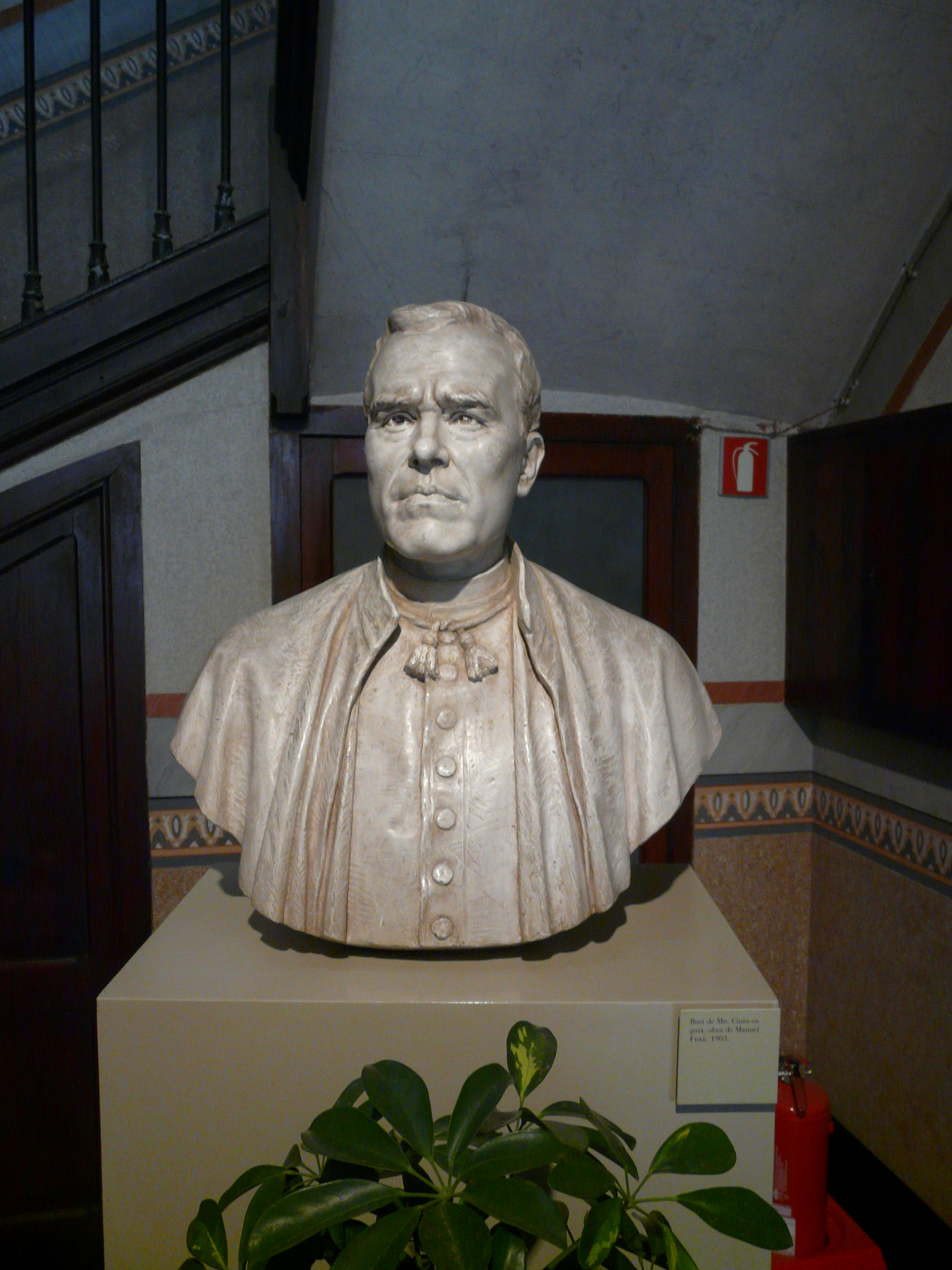 Vil·la Joana (Barcelona) Object location41° 25′ 11.24″ N, 2° 05′ 59.6″ E